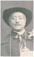 Kardinal Giulio Tonti, Vatikanischer Diplomat